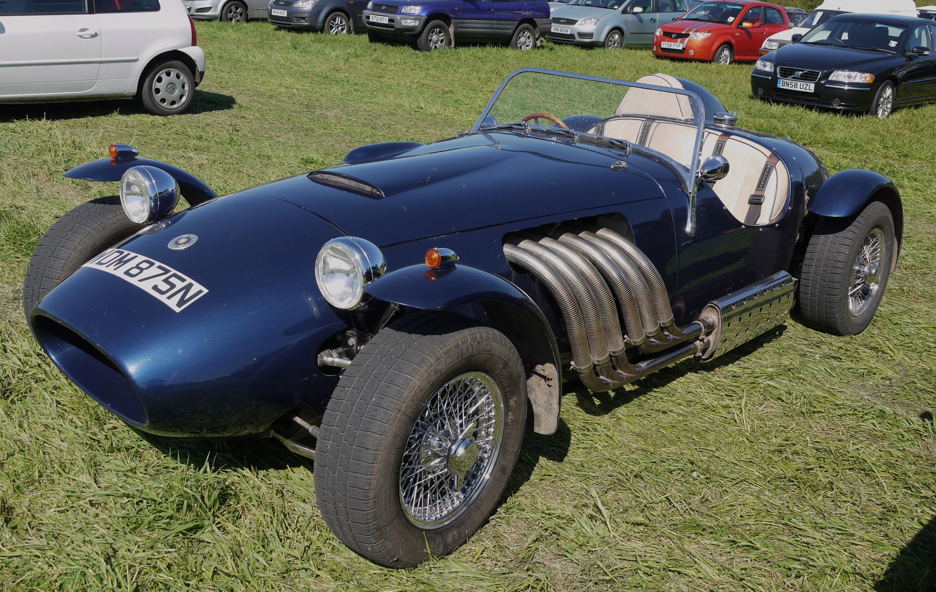 Panasonic G1 14-45 Lens